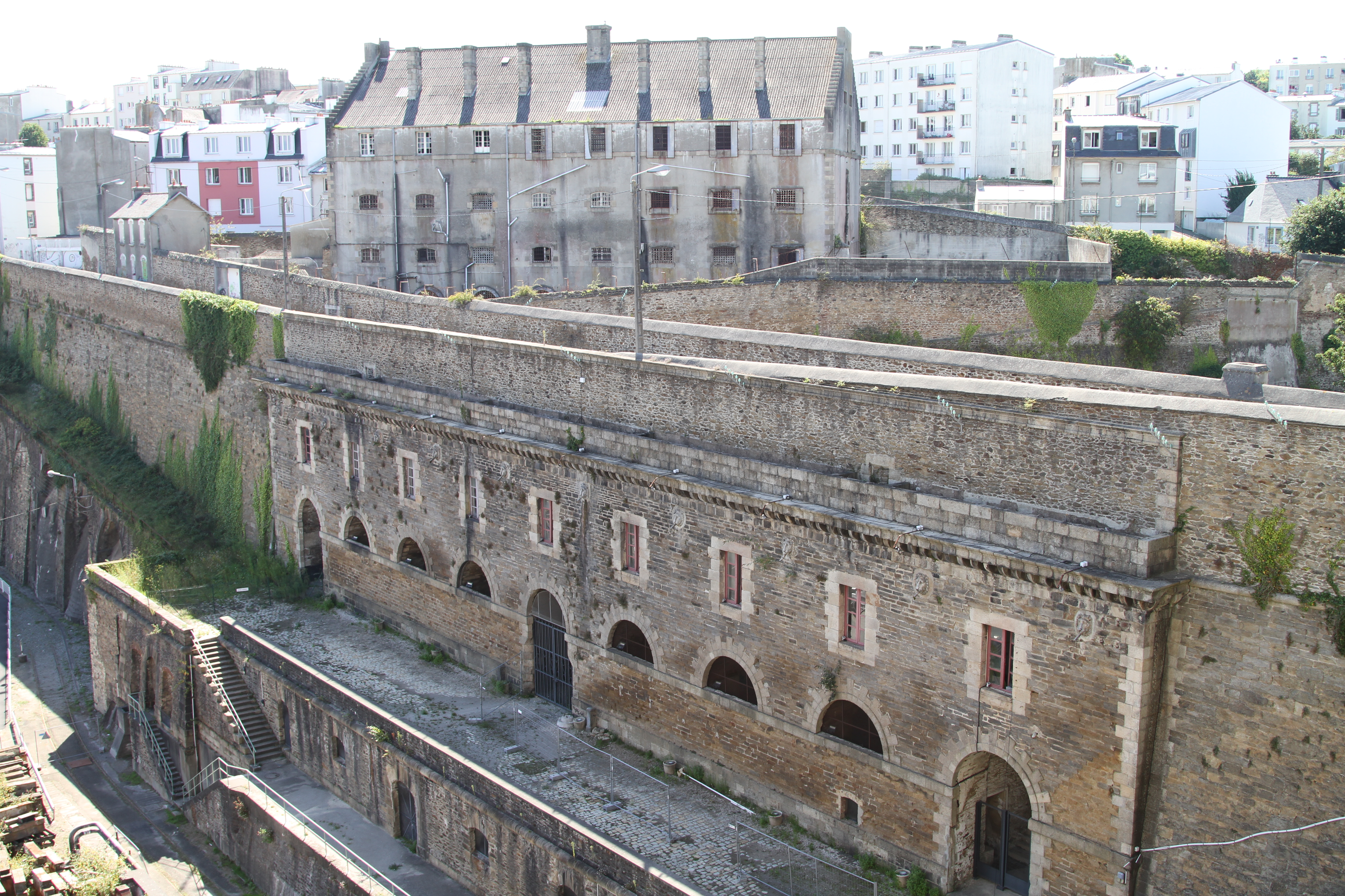 Bâtiment aux lions (classé monument historique) et l'ancienne prison de Pontaniou vus depuis le Plateau des Capucins